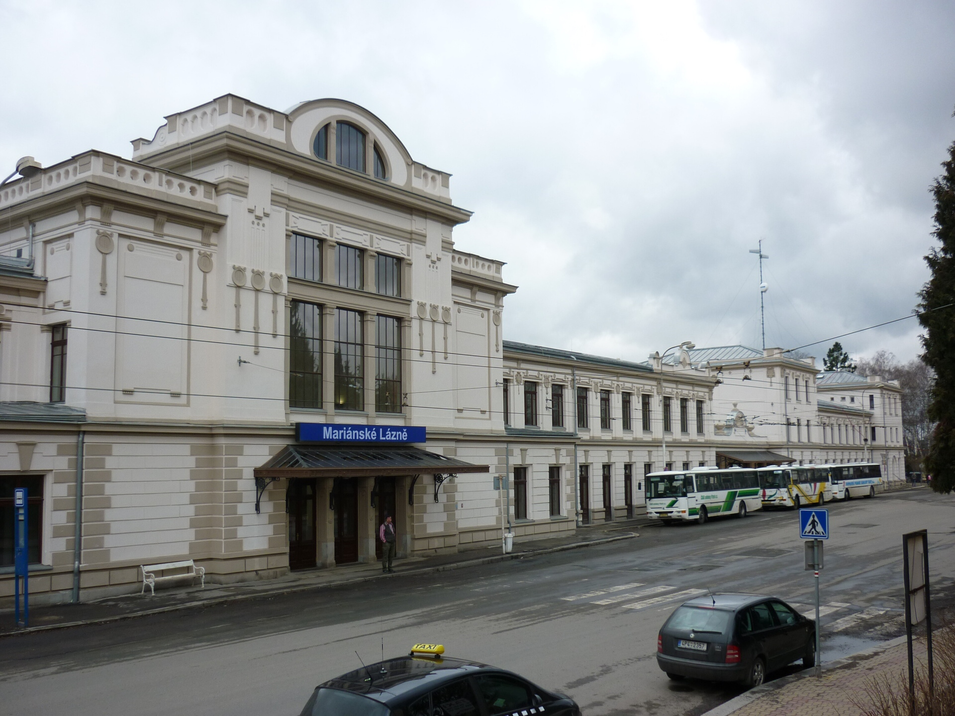 Mariánské Lázně - nádraží ČD